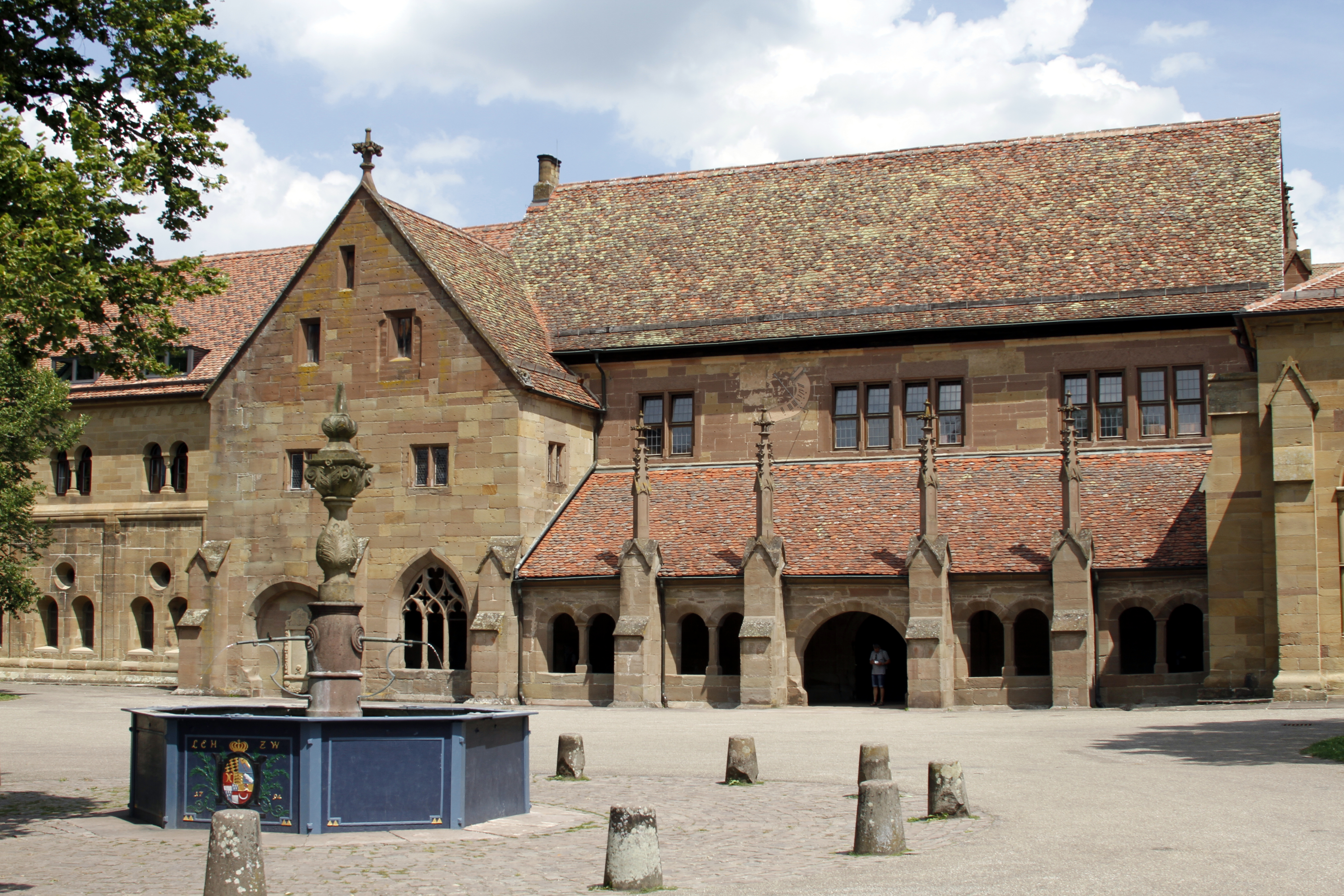 Maulbronn Monastery - Maulbronn - Germany